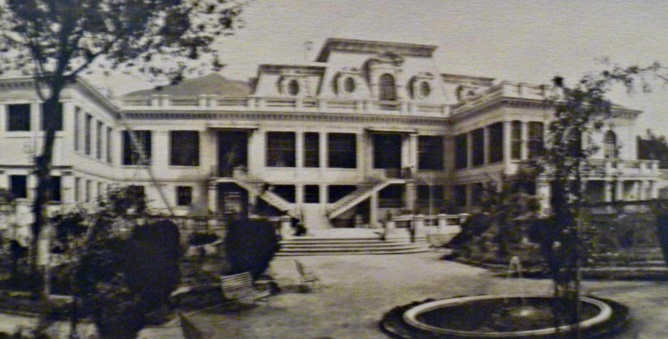 Vista del Palacio de Najas dsde los jardines orientales. Fotografía sobre papel, autor desconocido (1930).